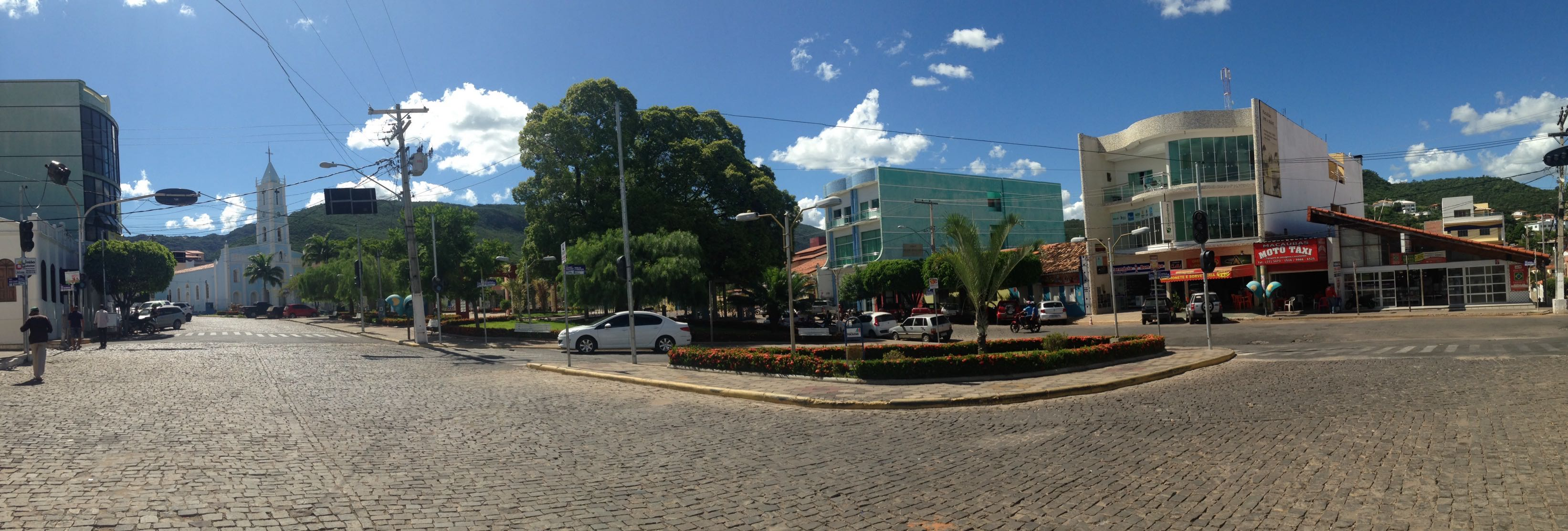 Cidade de Macaúbas, na praça Imaculada Conceição